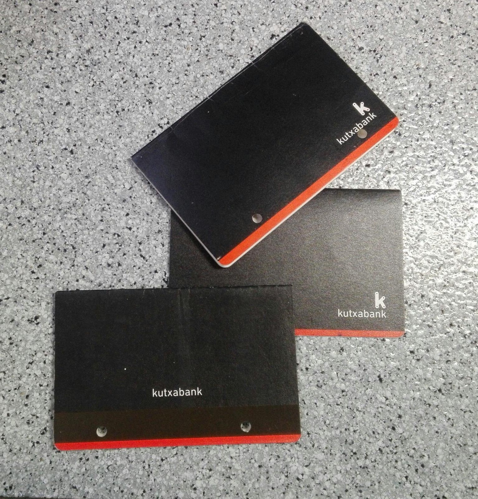 Hiru banku-libretaren argazkia